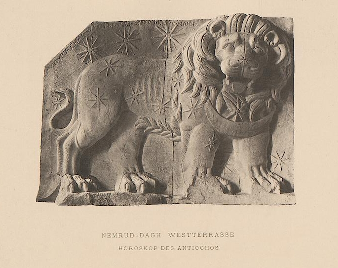 Abguss des Löwenhoroskops vom Nemrut Dağı, Türkei, durch Carl Humann, Berliner Museen